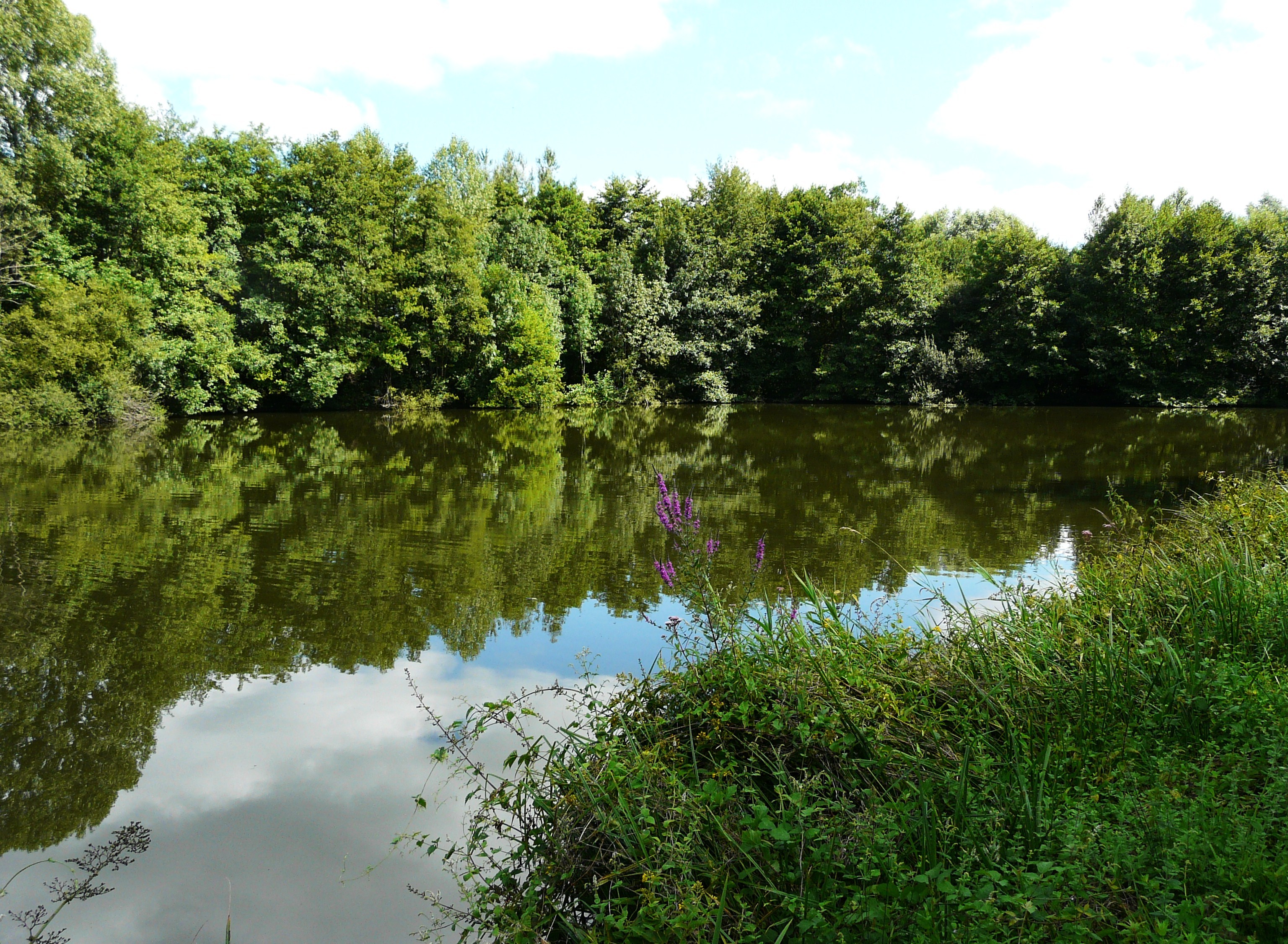 Alimenté par la Beauronne, l'étang de Beaufort à Saint-Front-de-Pradoux, Dordogne, France